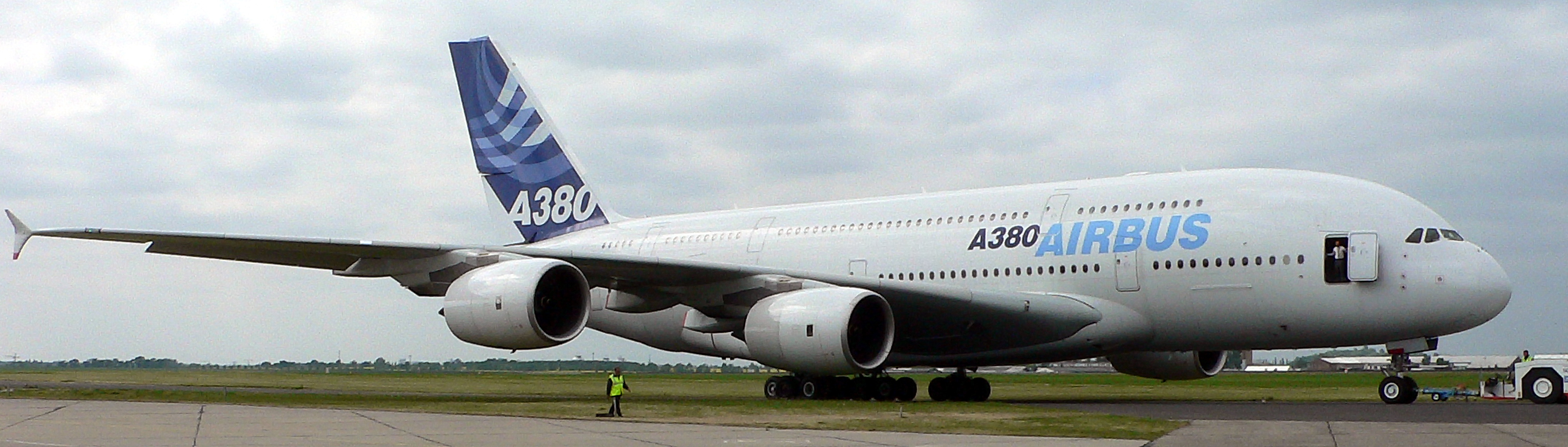 Airbus A380